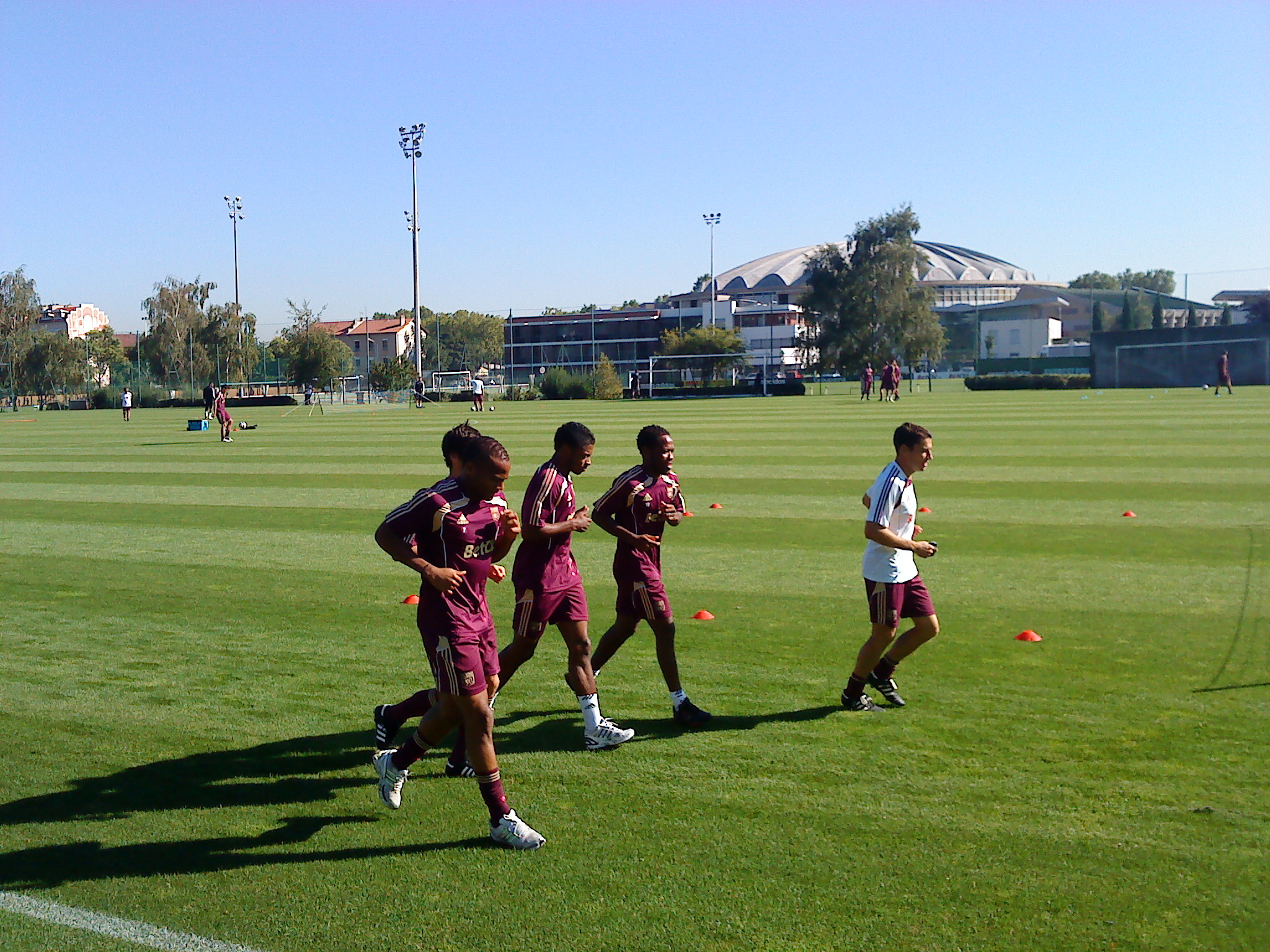 Entrainement des joueurs de l'Olympique lyonnais sur les terrains de Tola Vologe. De gauche à droite : Jimmy Briand, Michel Bastos, Jean II Makoun. À droite en blanc : Vincent Espié Caché derrière Jimmy Briand : Yoann Gourcuff